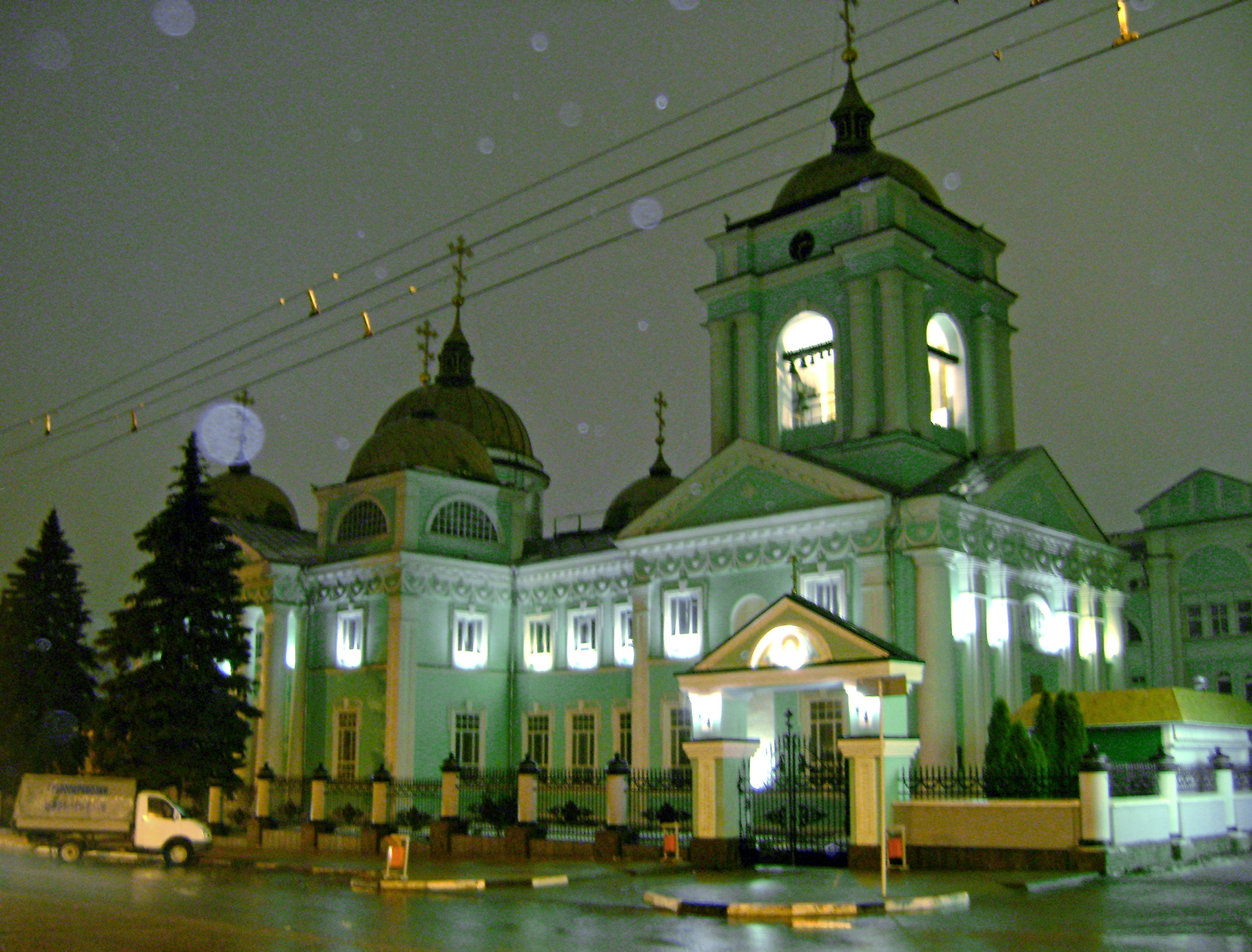 Вид Преображенского кафедрального собора в вечернее время со стороны здания бывшей мужской гимназии.